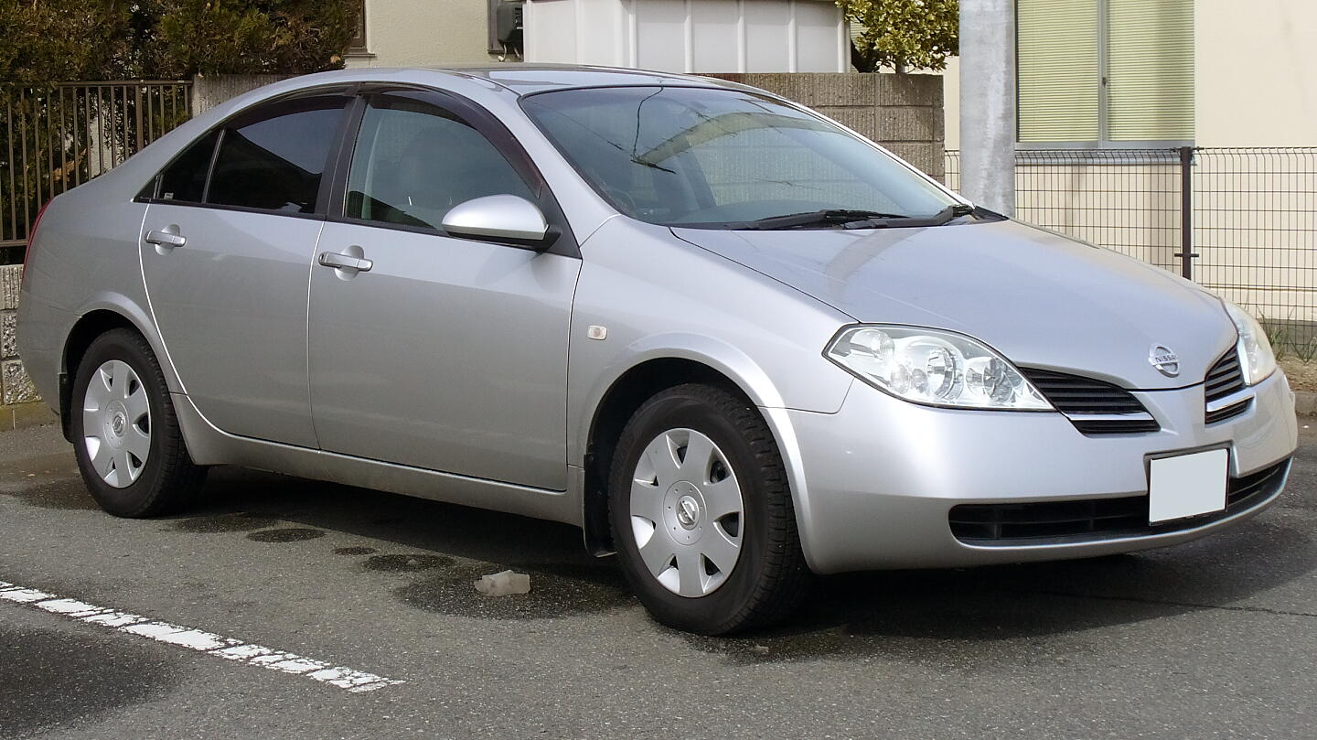 日産・プリメーラセダン（3代目）。2001年度グッドデザイン金賞受賞。